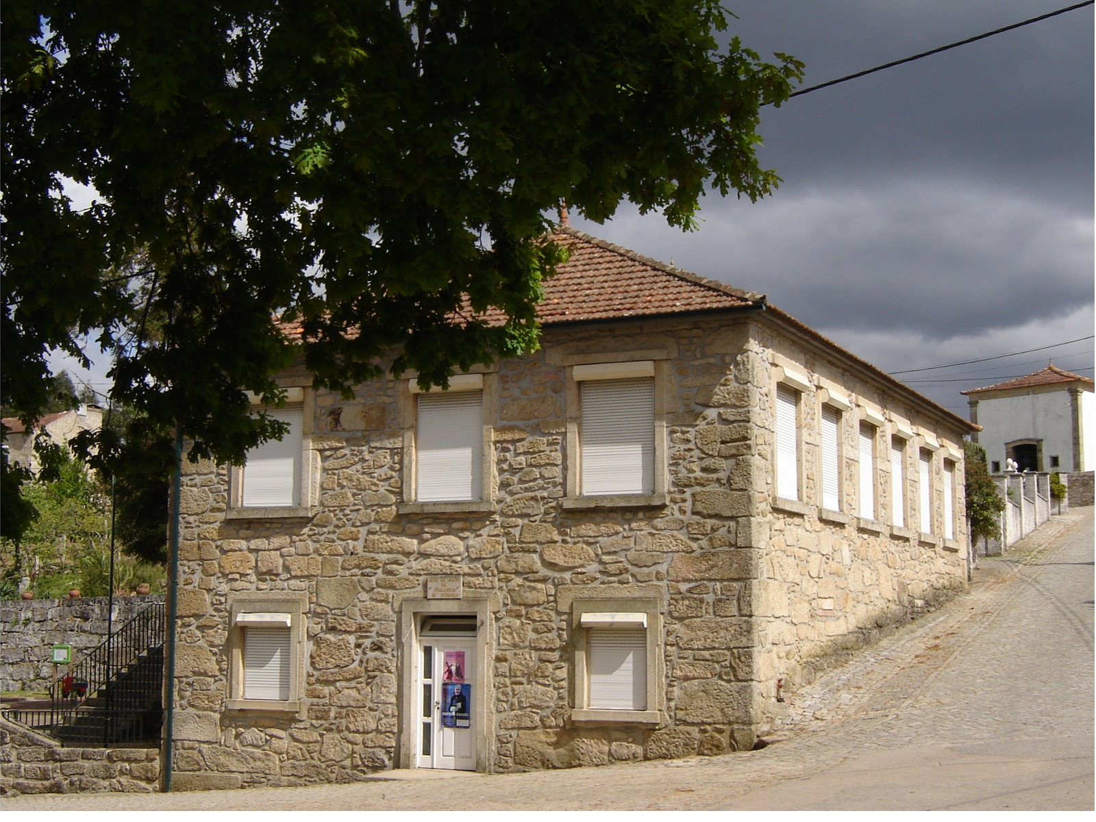 Junta de freguesia de Verdoejo